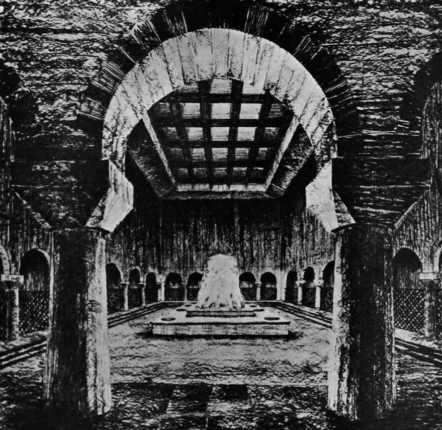 Anıtkabir projesinin ilk sürümündeki Şeref Holü'nün görünümü